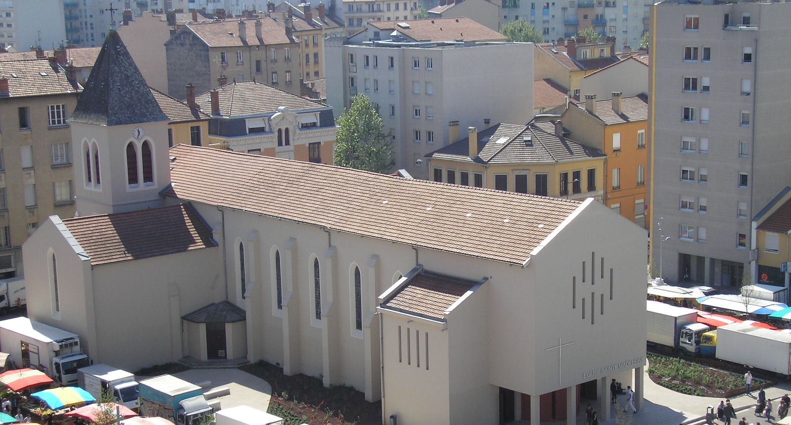 Église Sainte Madeleine des Charpennes à Villeurbanne vue globale depuis un immeuble de la place Wilson